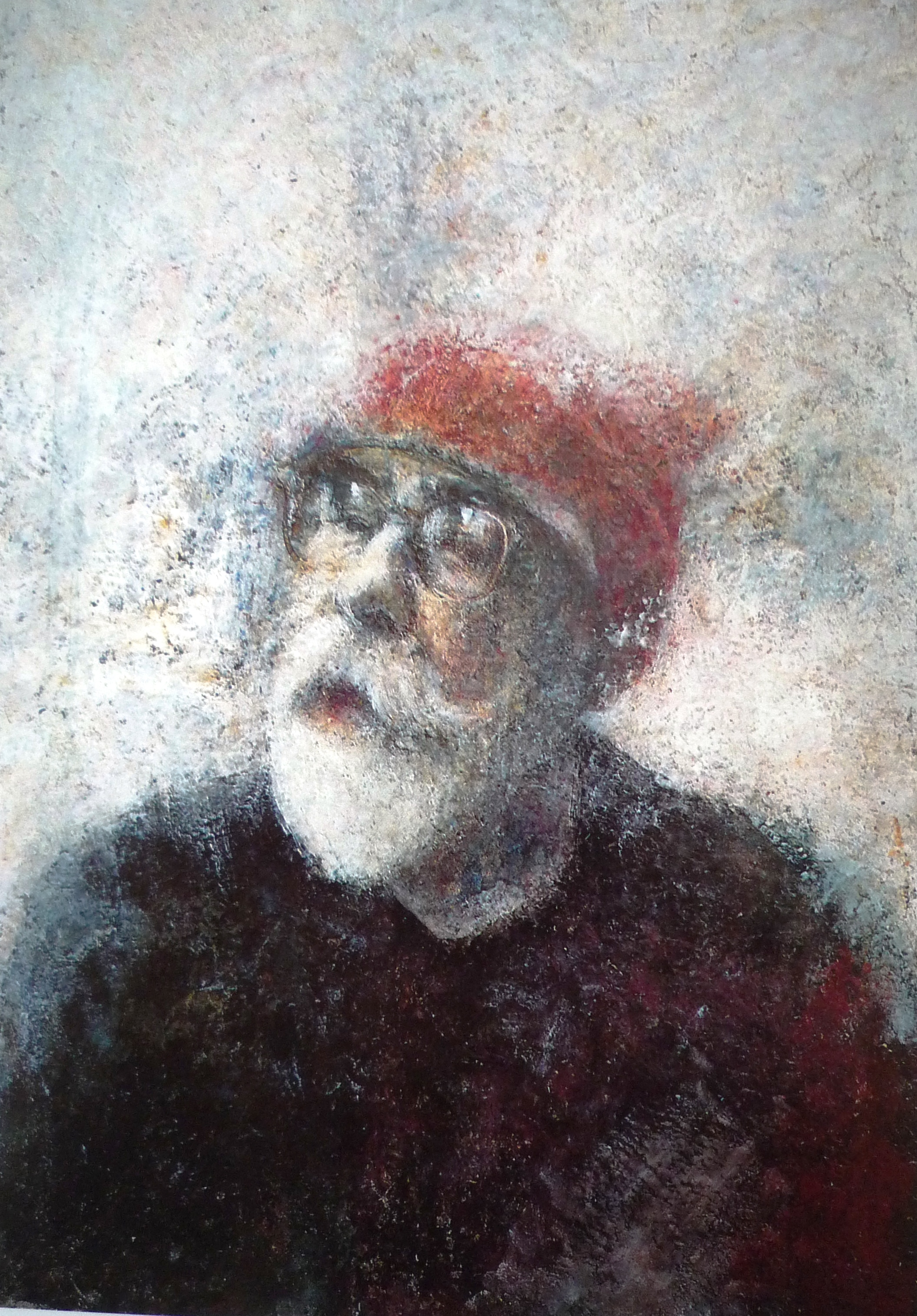 Vladimír Suchý obraz 1